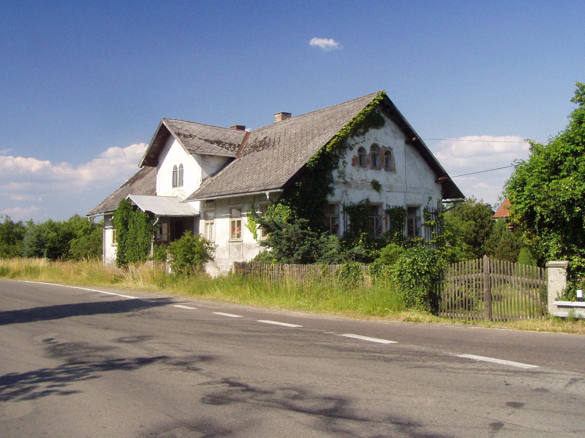 Břehy, Žďár